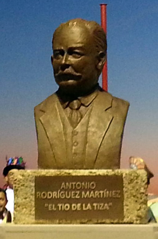 El Tío de la Tiza